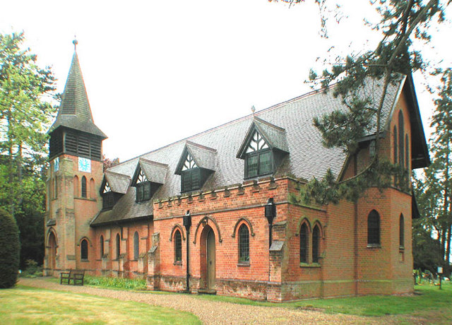 St Nicholas, Kelvedon Hatch, Essex